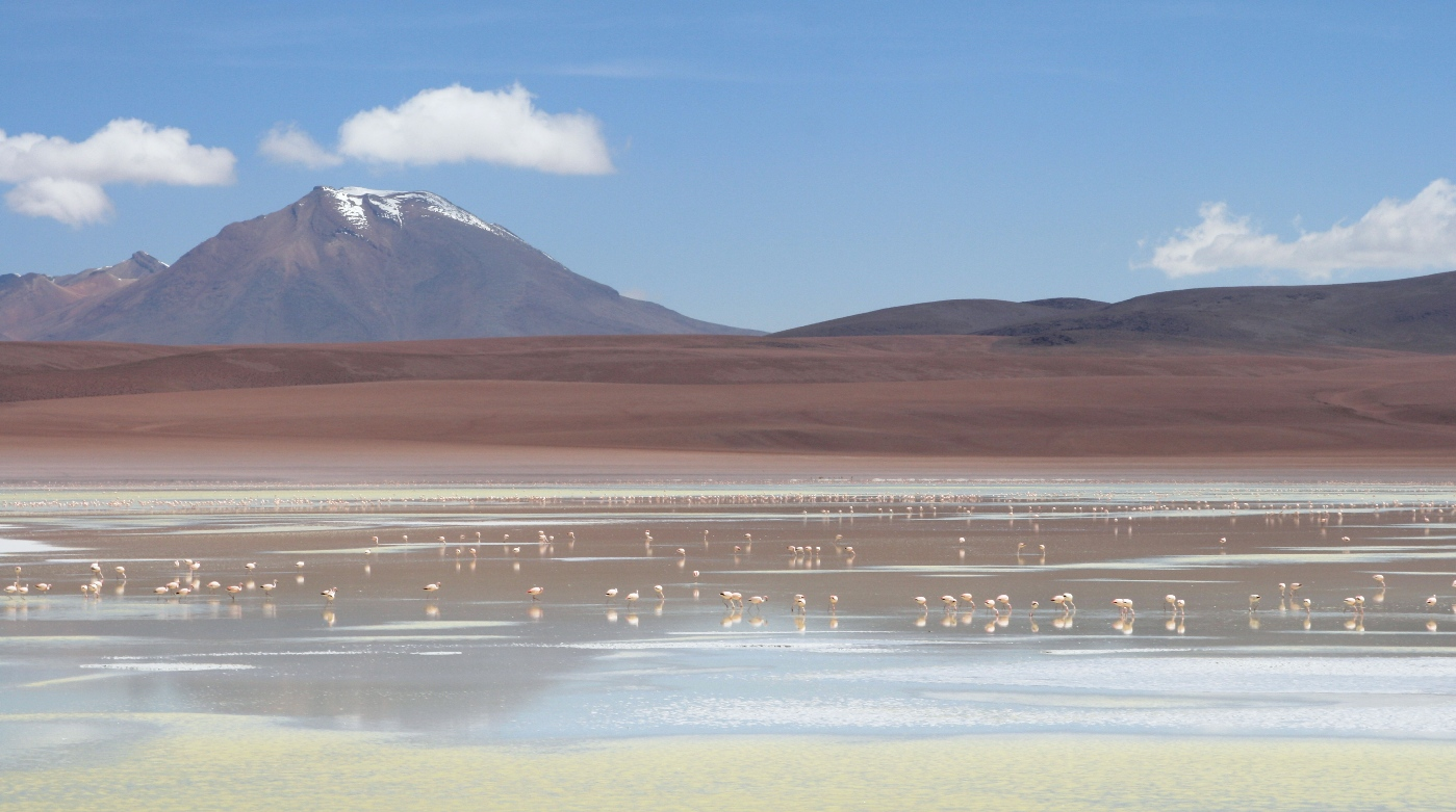 vista de la laguna Khara ubicada en el departamento boliviano de Potosí.